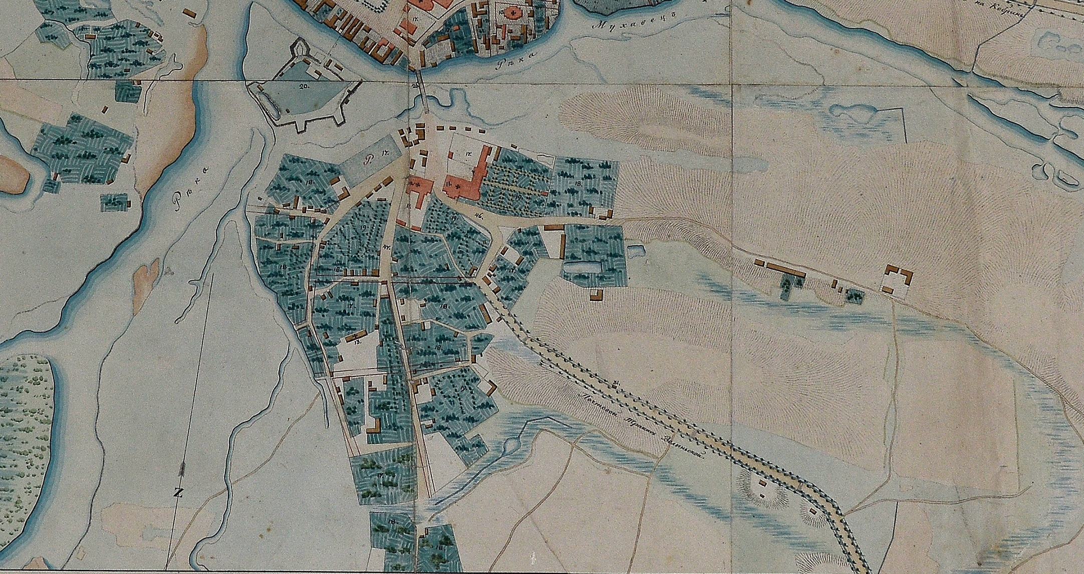 План Літоўска-Гродзенскай губерні горада Бржэсця з пражэктам (складзены снежня 24 дня 1824 года) // Гродзенскі дзяржаўны гісторыка-археалагічны музей